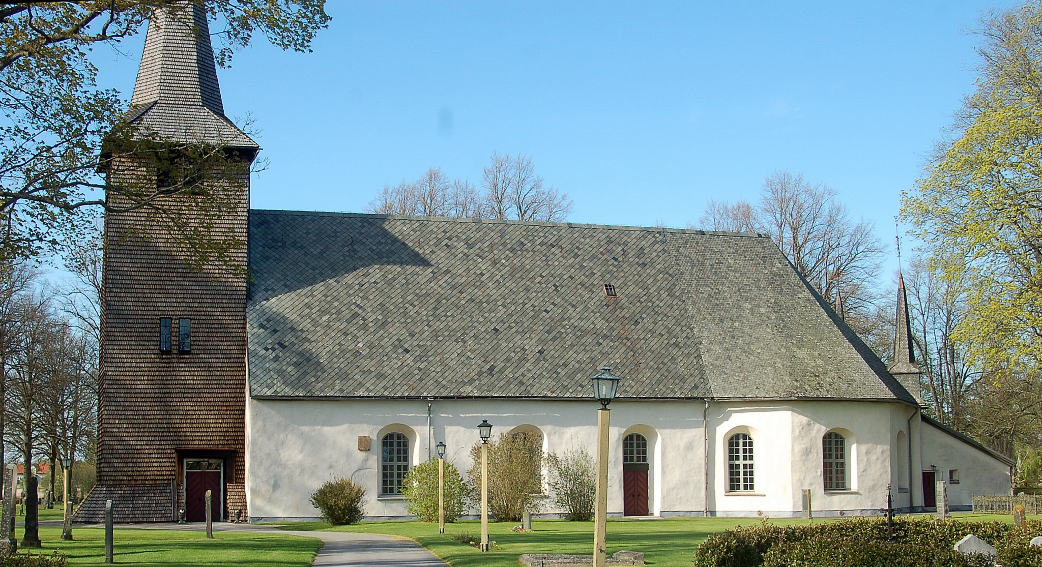 Amnehärads kyrka från söder